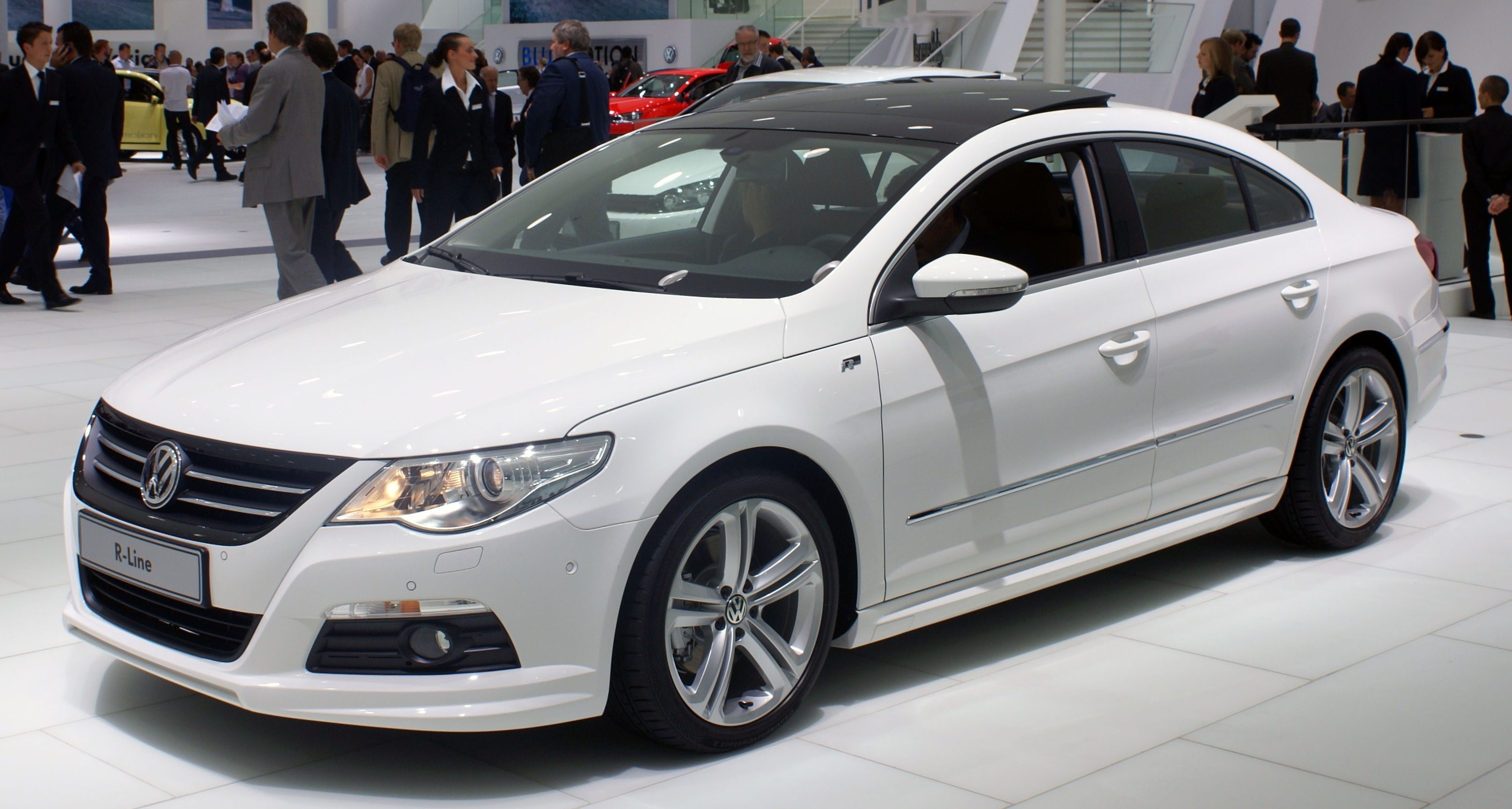 VW Passat CC R-Line